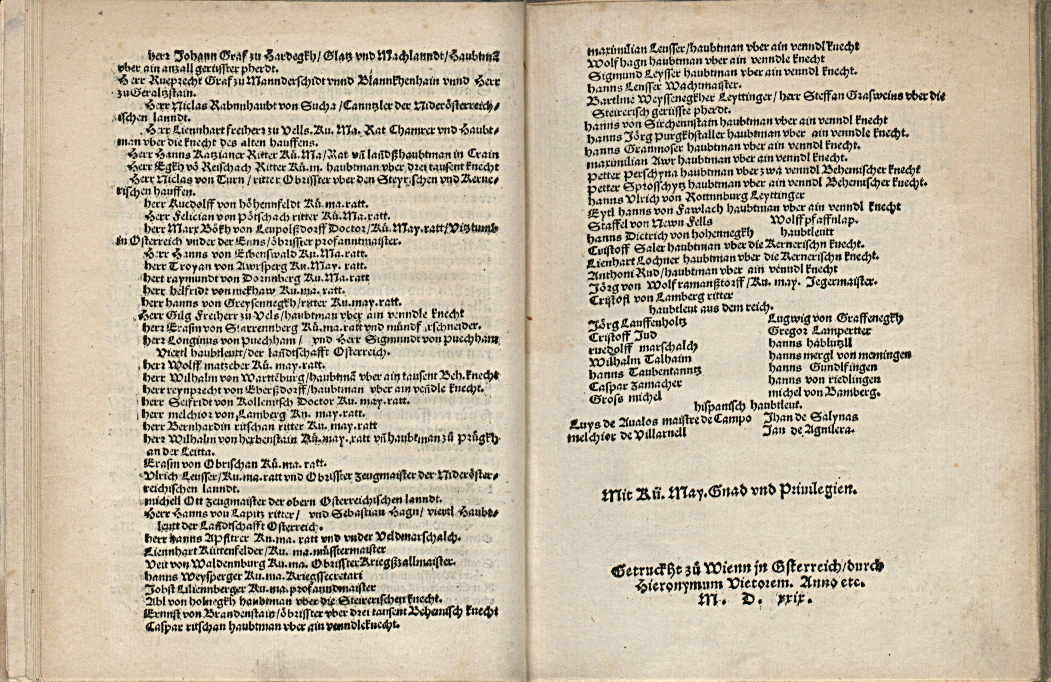 Belegerung der Statt Wienn im jar als zallt nach Cristi geburt 1529: kürtzlich angezaigt, Wienn, Hieron. Vietor., 1529